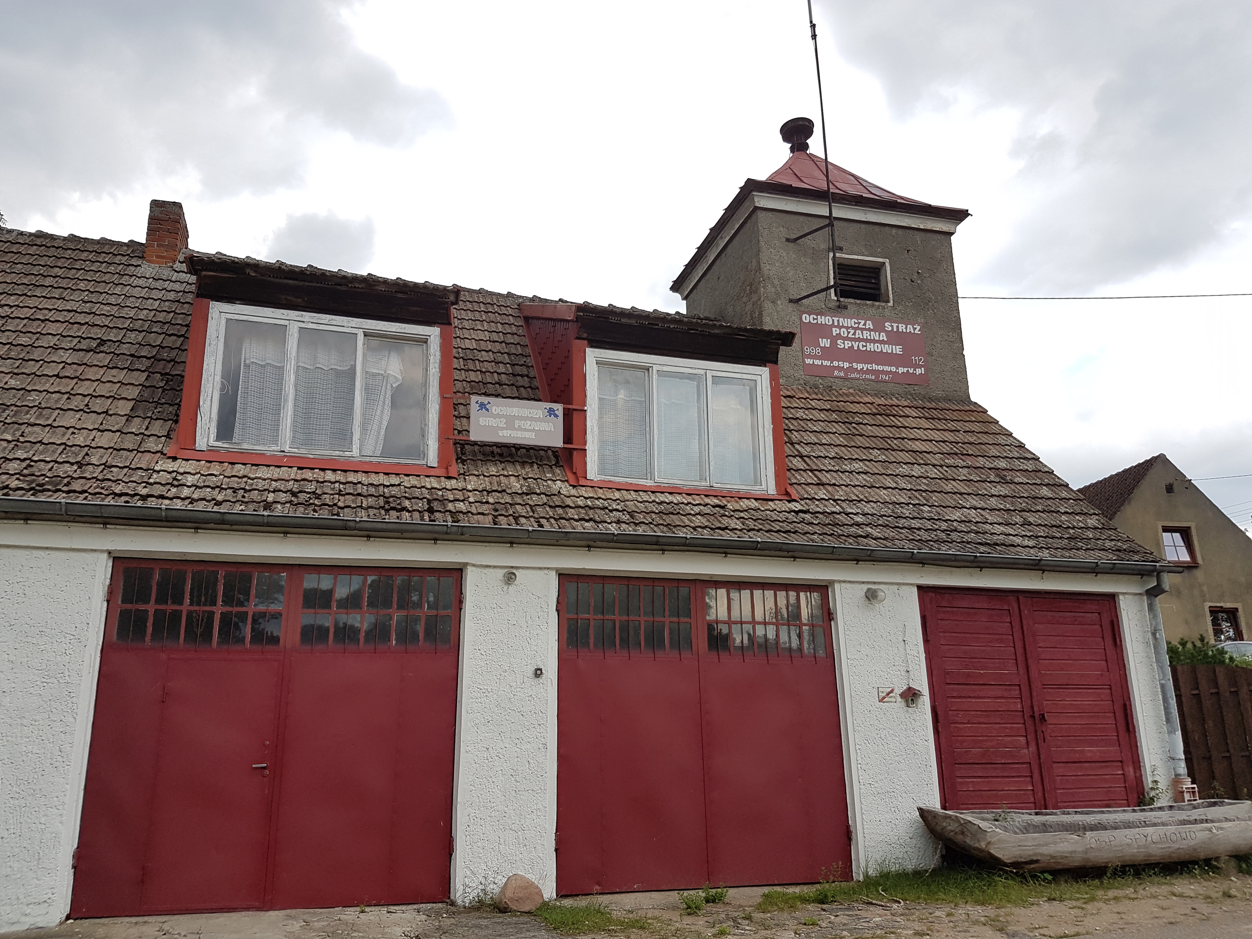 OSP Spychowo